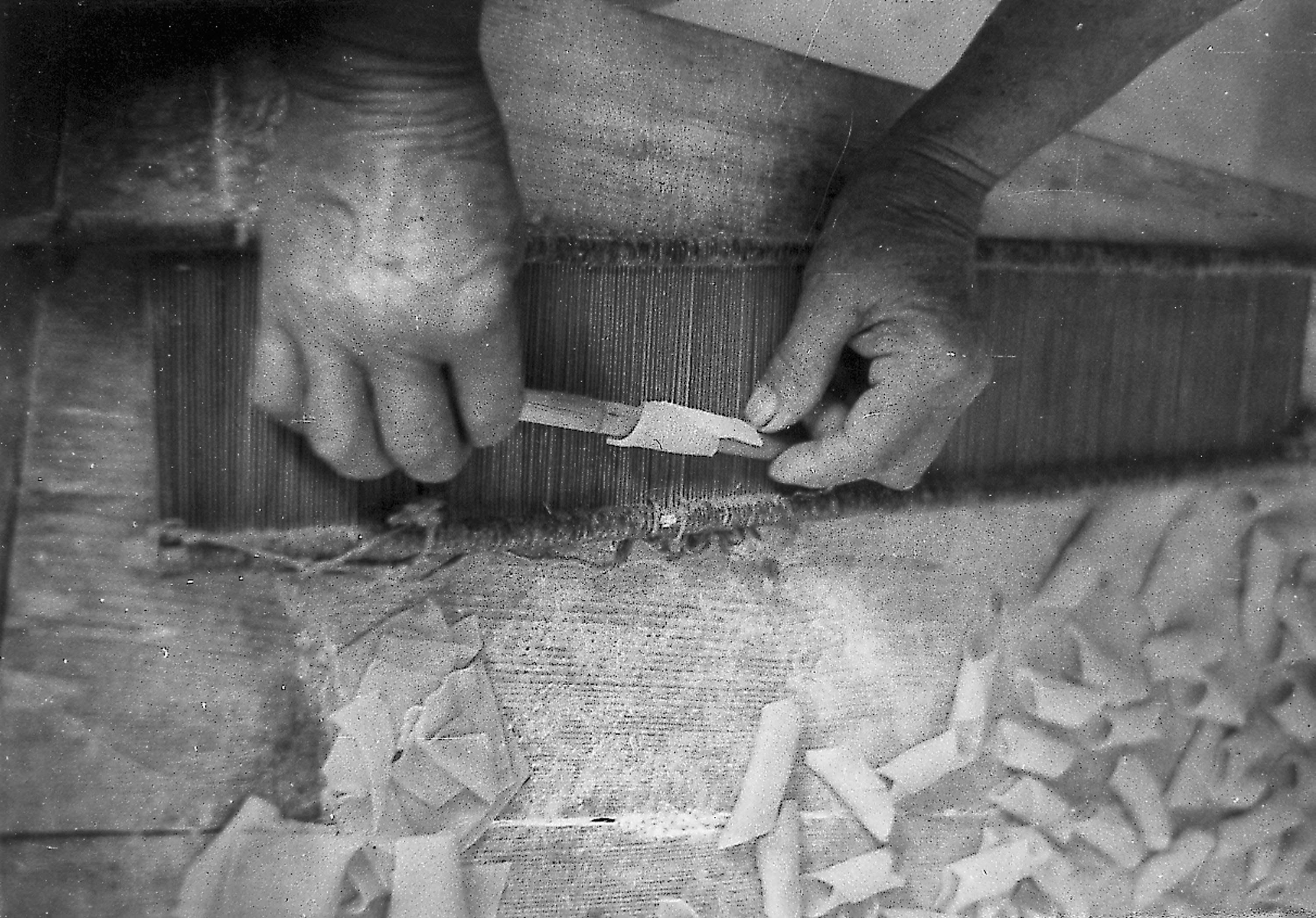 QUARÀNTOLI di MIRANDOLA (MO) - La preparazione domestica dei maccheroni rigati (i makarón kol pét(ä)n) (1959 — fot. n. 8104)